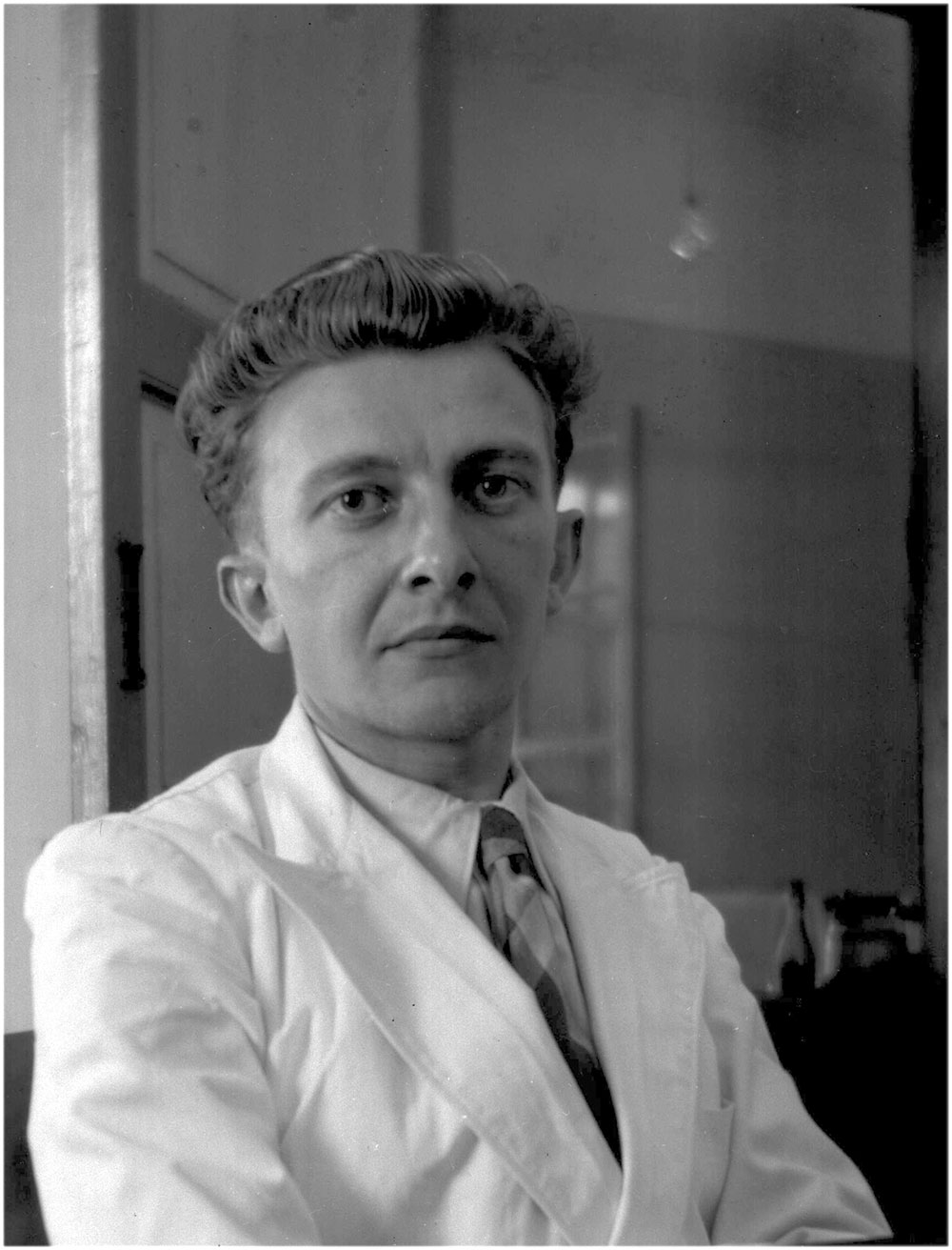 Jean Suret-Canale